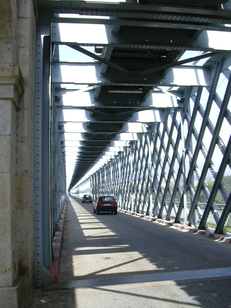 Ponte internacional sobre o Rio Minho, fronteira entre Espanha e Portugal (Tui e Valença do Minho)